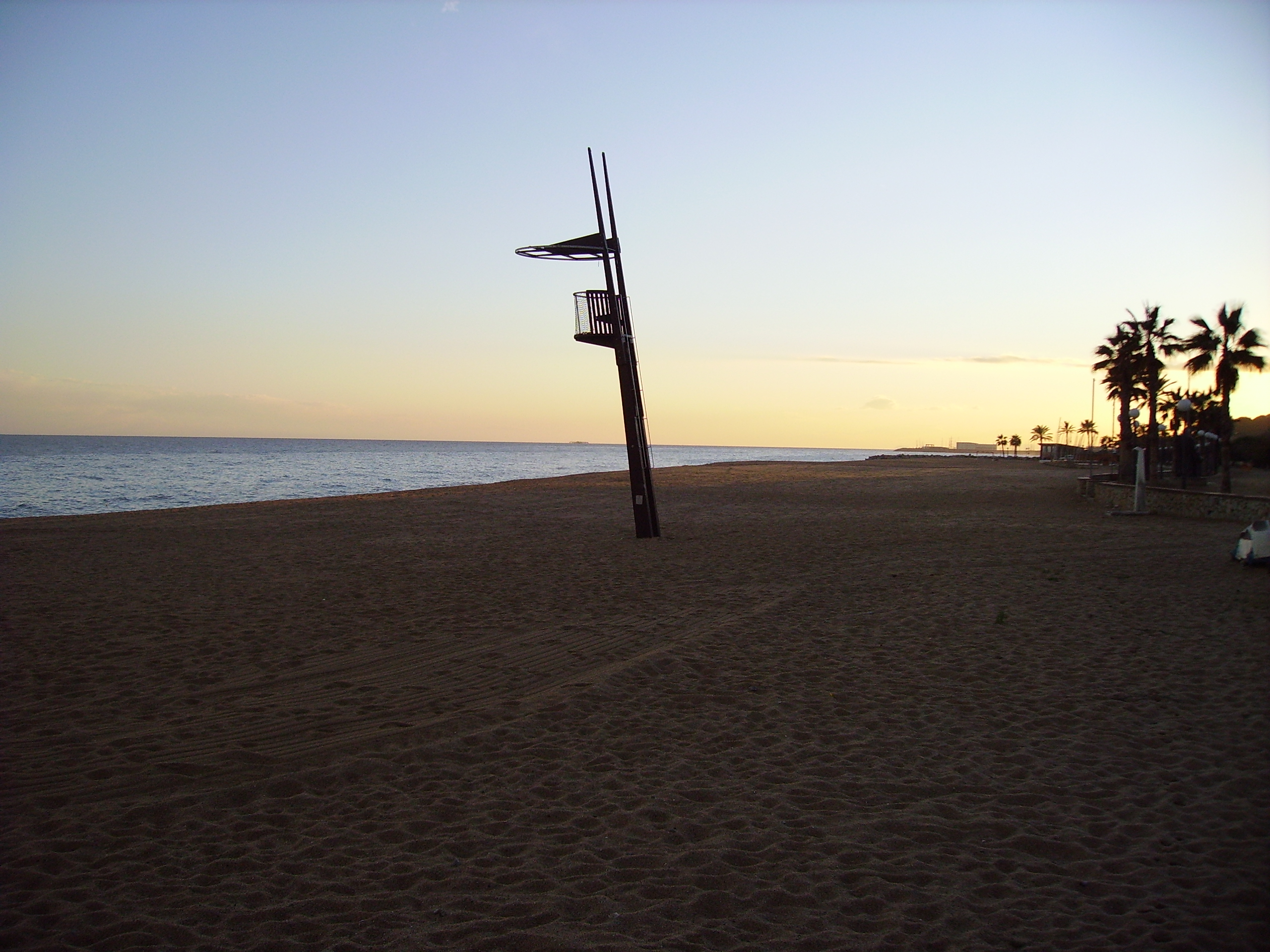 Platja de Canet de Mar, El Maresme, Catalunya.